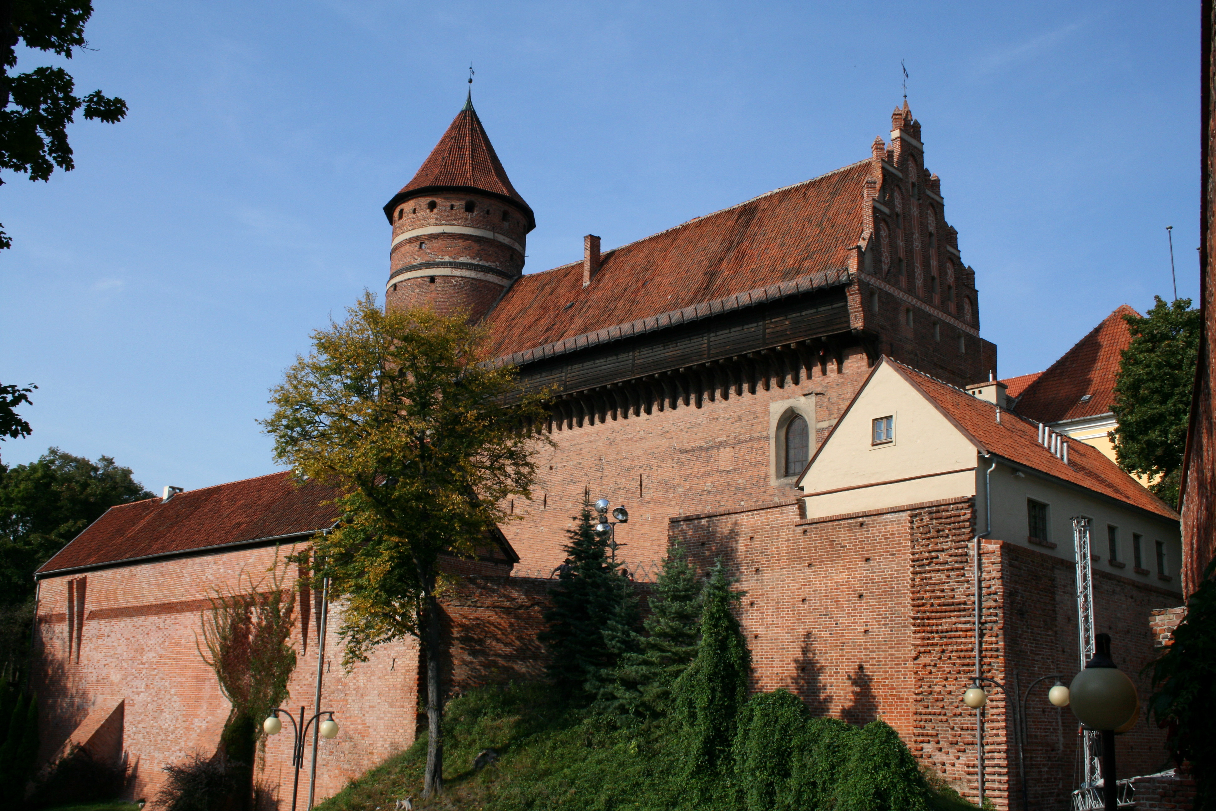 Olsztyn, ul. Zamkowa 2 - zamek z podzamczem, XIV-XVII, XIX